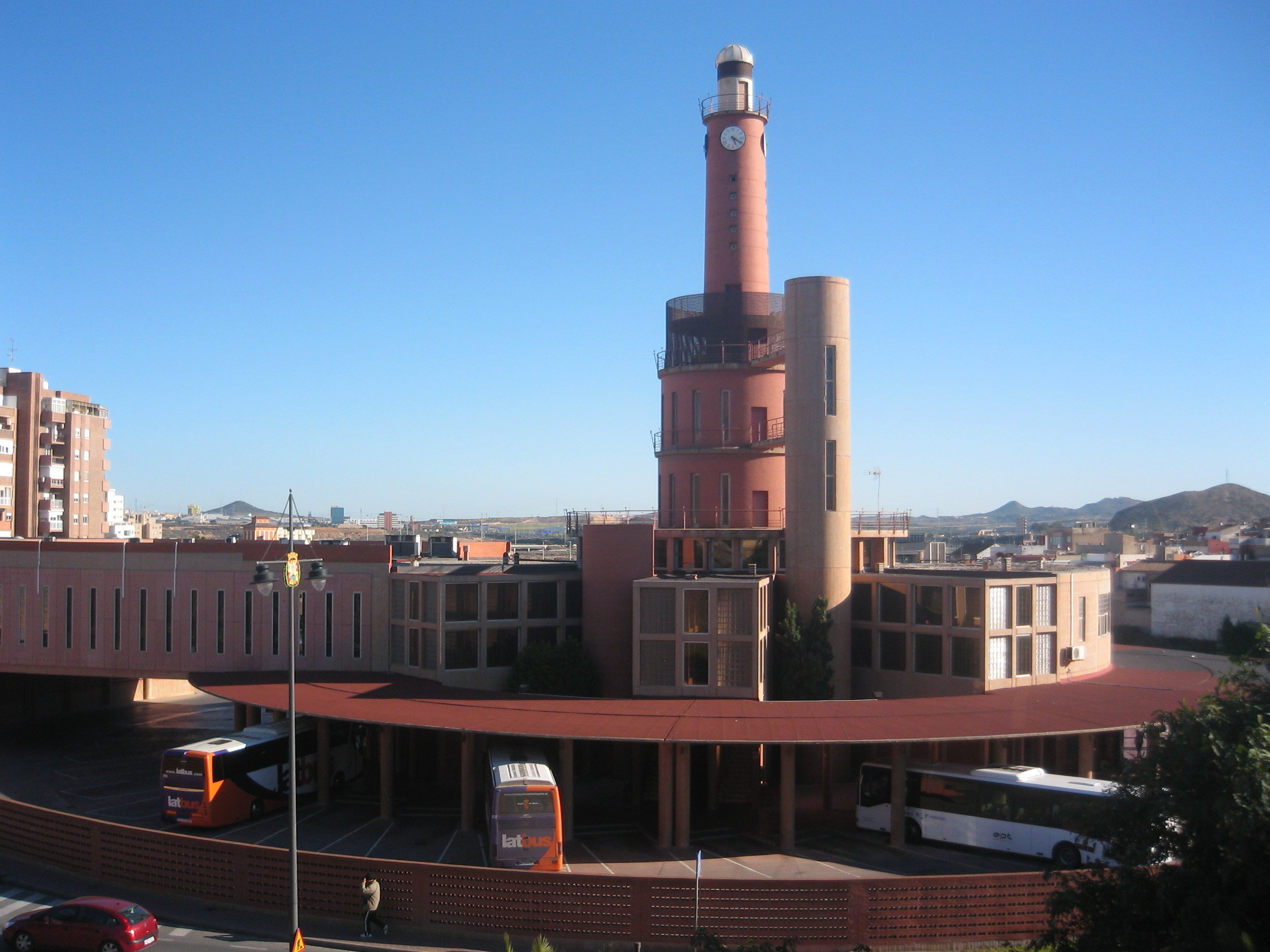 La Estación de autobuses de Cartagena (España).